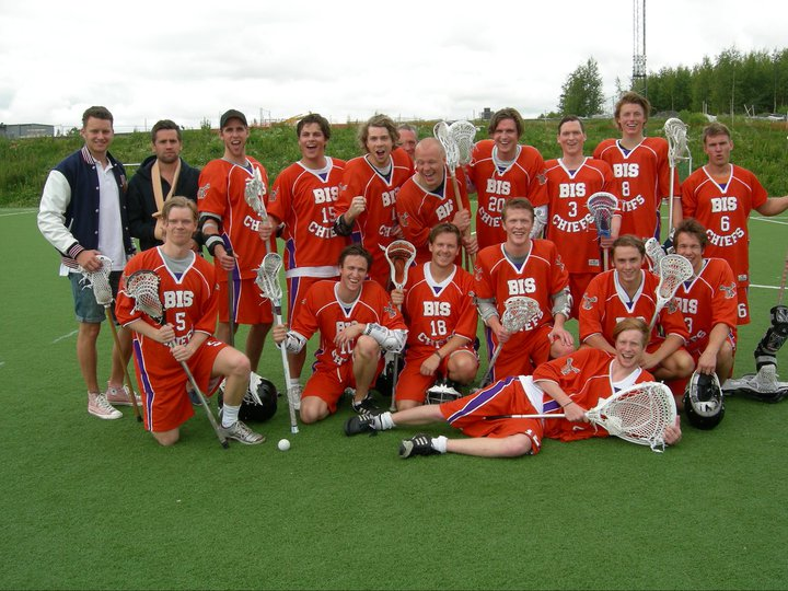 Lagbilde av BIS Lacrosse, lacrosselaget ved Handelshøyskolen BI i Bergen. Bildet er tatt under norgesmesterskapet i 2011 på Snarøya.